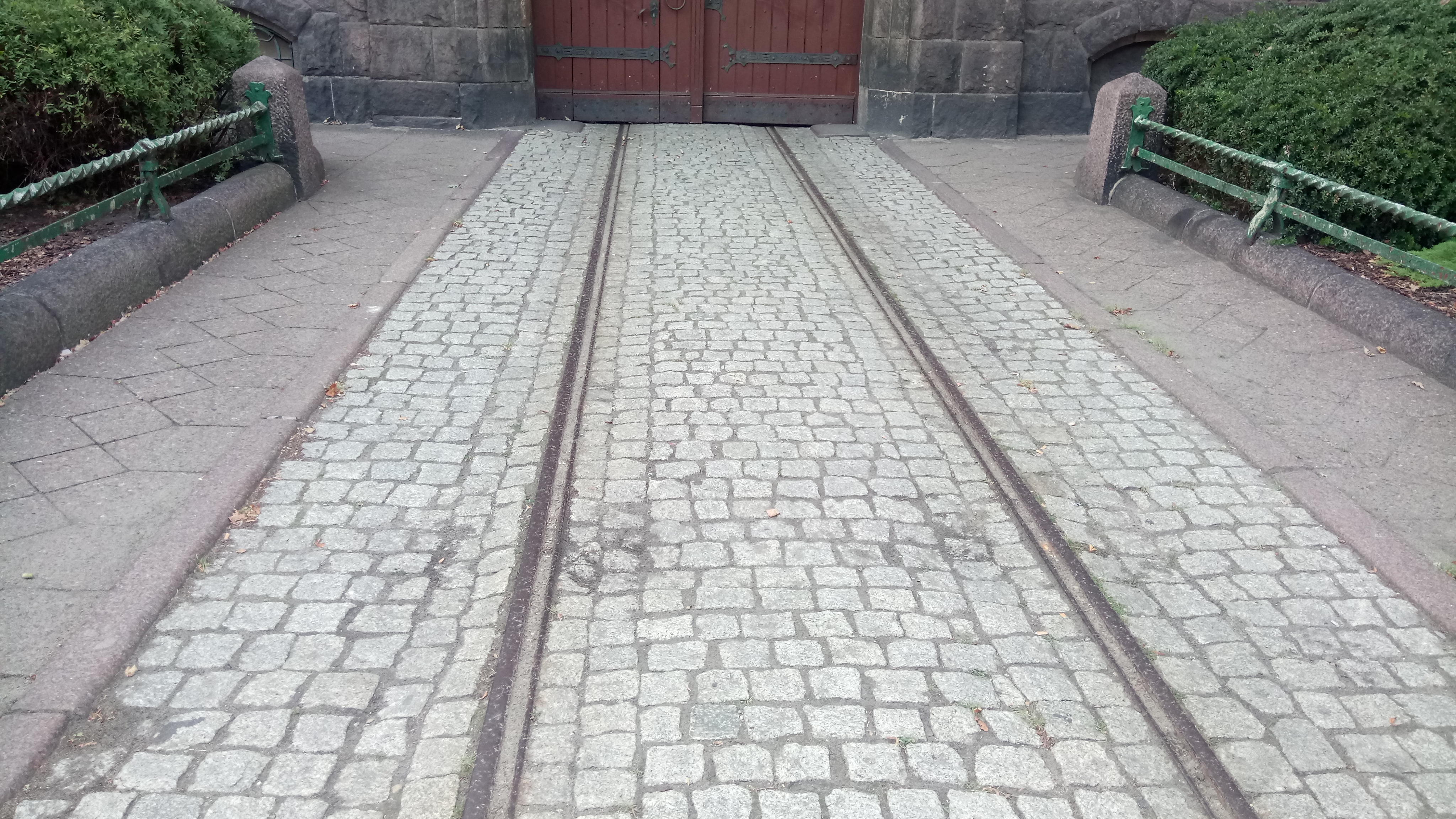 Torowisko tramwaju pocztowego w Szczecinie, al. Niepodległości